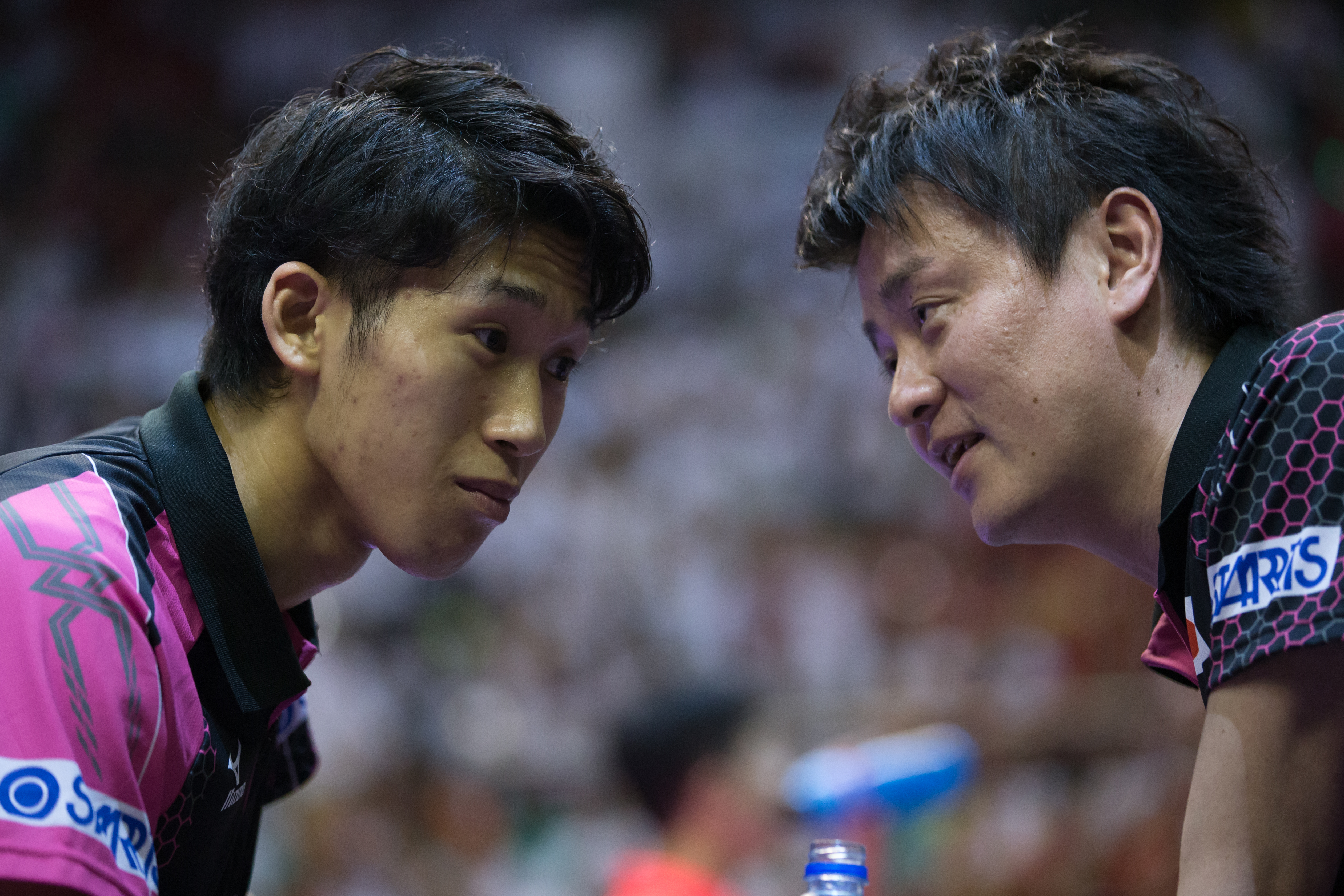 _K0K7237